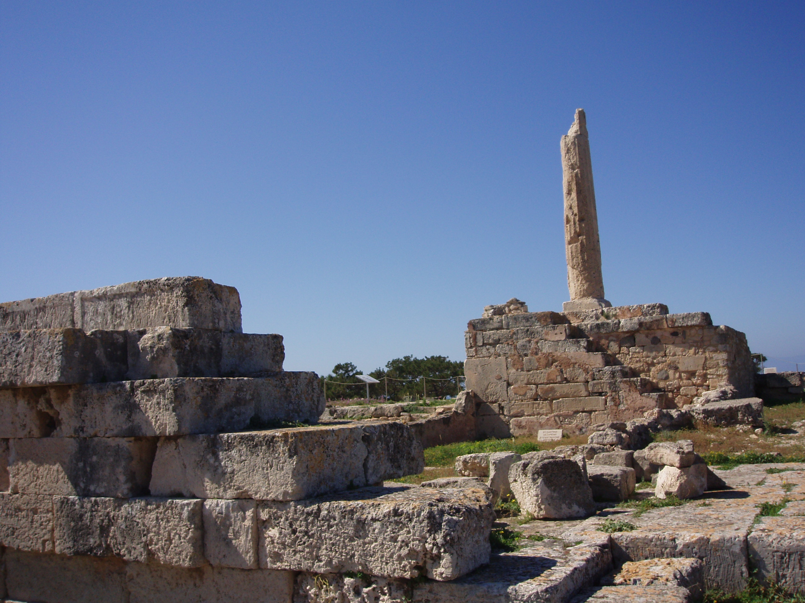 Apollontempel auf Ägina